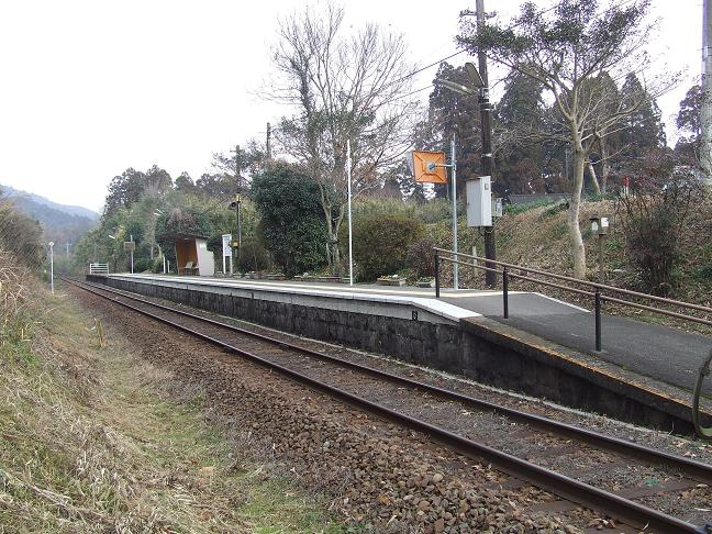 JR吉都線東高崎駅の写真